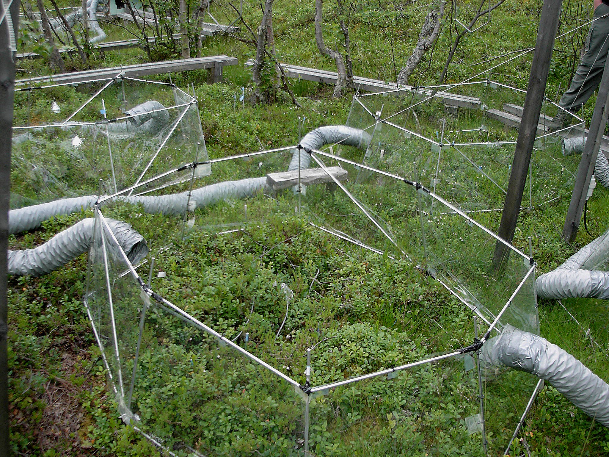 CO²-Begasungs-Experiment der Naturwissenschaftlichen Station Abisko (Nordschweden) in einem Tundramoor am Torneträsk